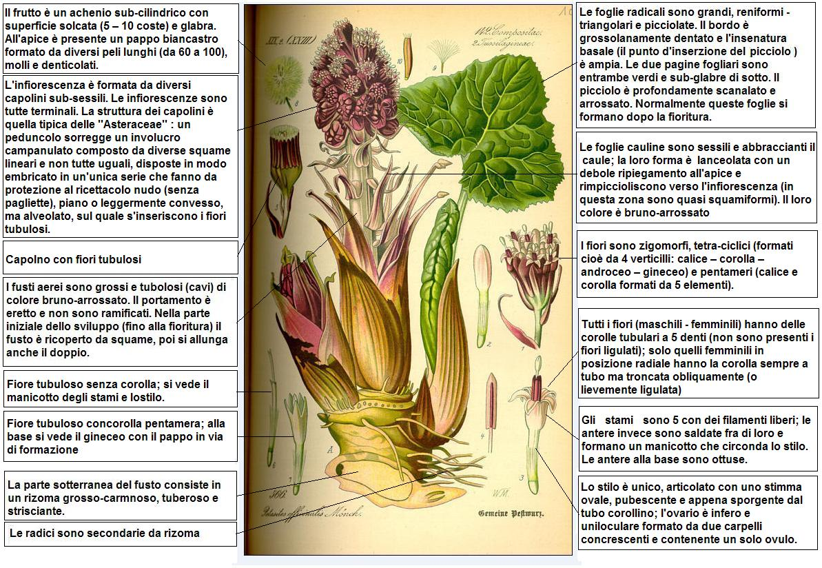 Astrantia major